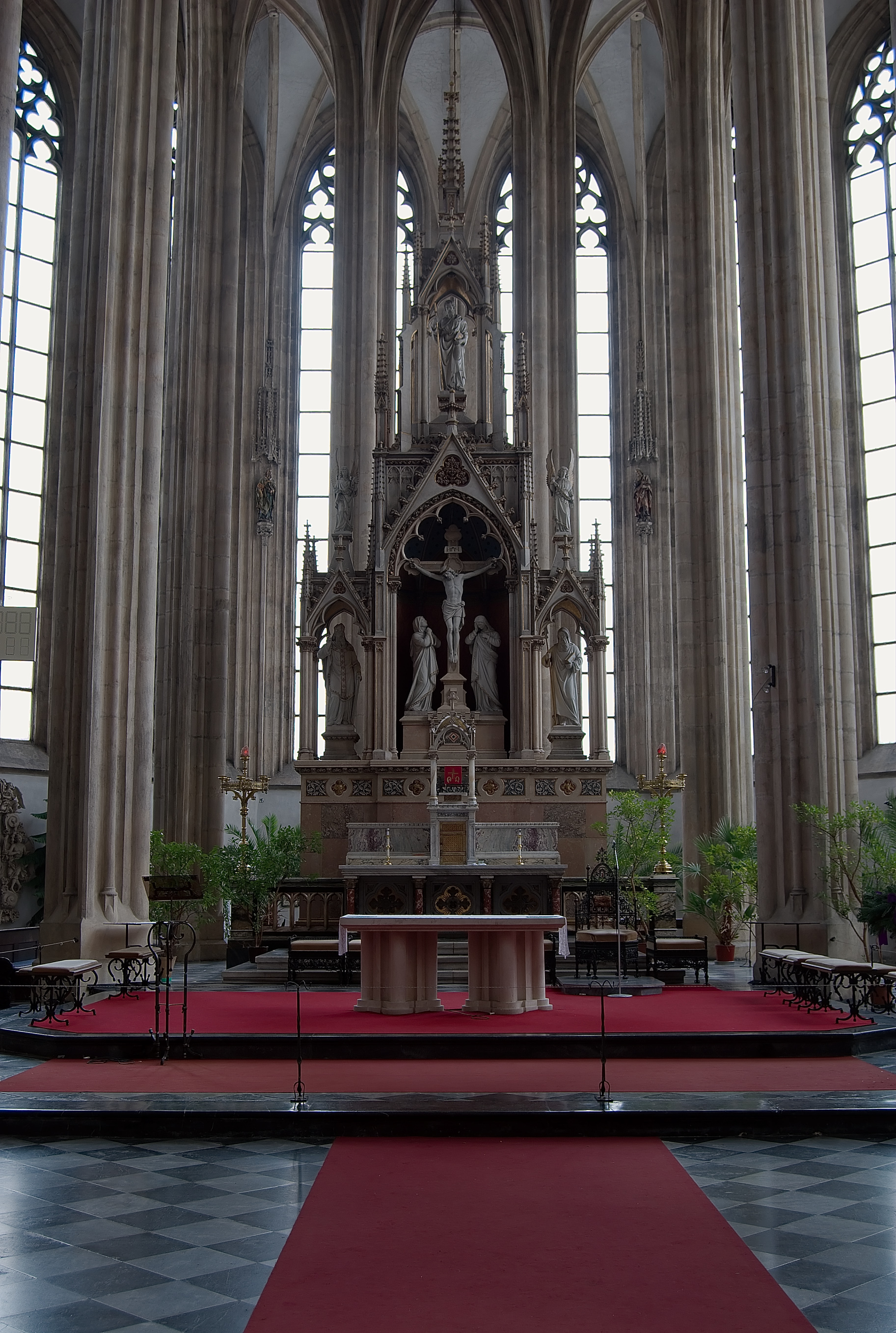 Město Brno - hlavní oltář v kostele Sv. Jakuba od západu